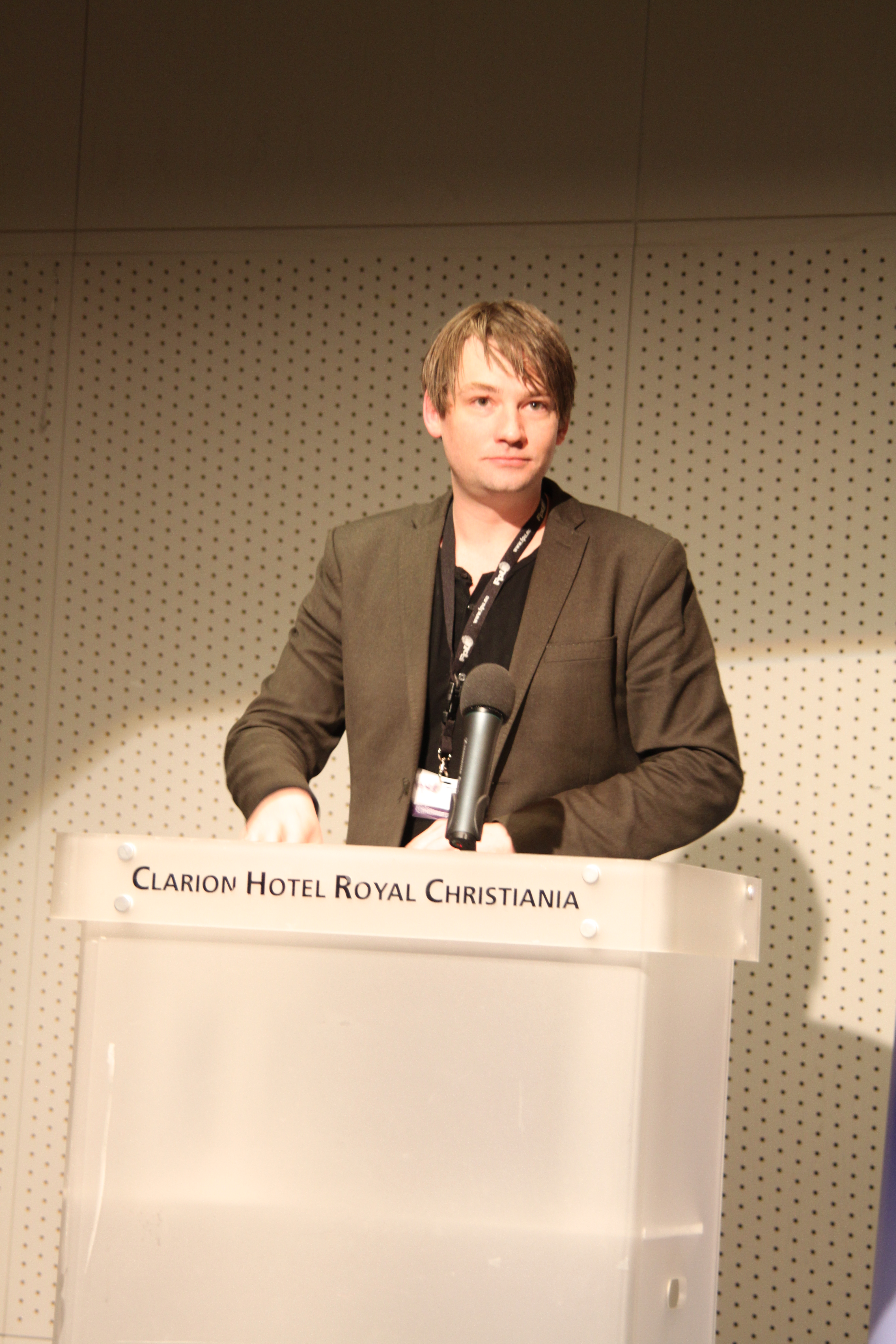 Henrik Asheim holder hilsningstale på Fremskrittspartiets ungdoms landsmøte 2012